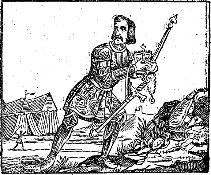 Gravure extraite de Les quatre fils d'Aymon, histoire héroïque, M. Ardant (Limoges), 1849 (Gallica : ark:/12148/bpt6k5734522, Bibliothèque nationale de France, département Littérature et art)